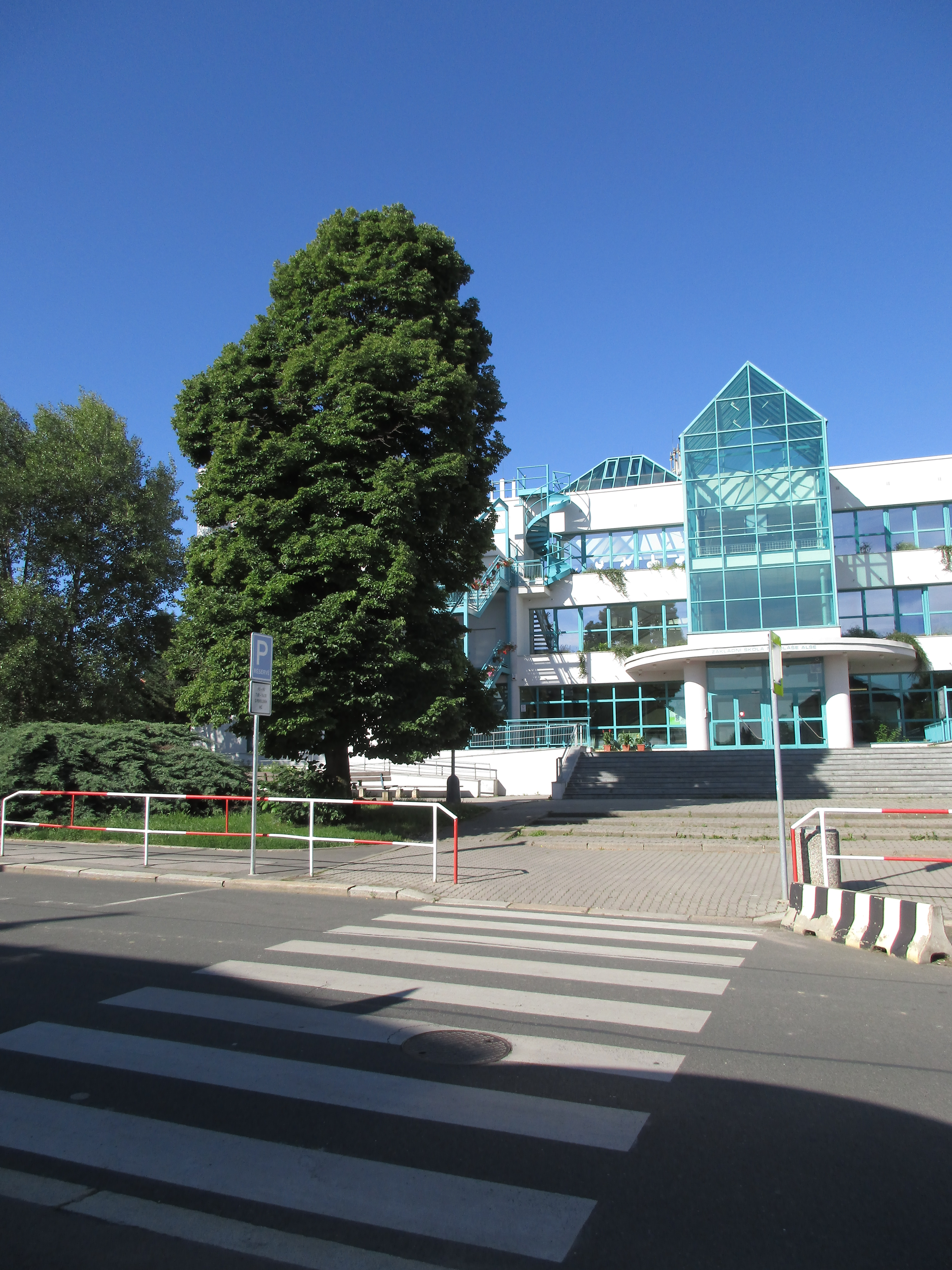 Lípa obecná (Tilia x vulgaris). Praha 6 - Suchdol, Suchdolská. Vysazena 27. října 1968 na památku 50. výročí vzniku Československé republiky. Významný strom, evidenční číslo MHMP: 66, v databázi od roku 2016.